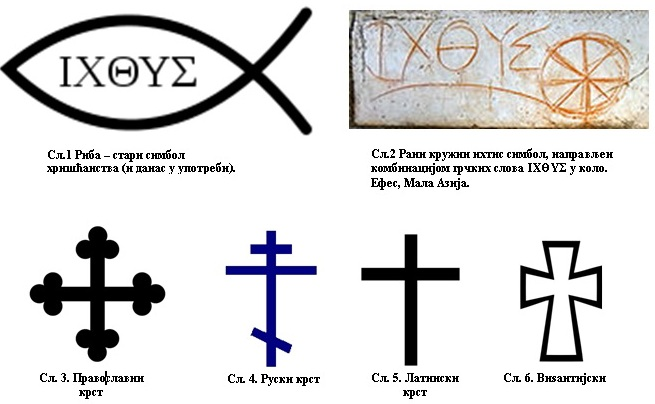 Хришћански симболи